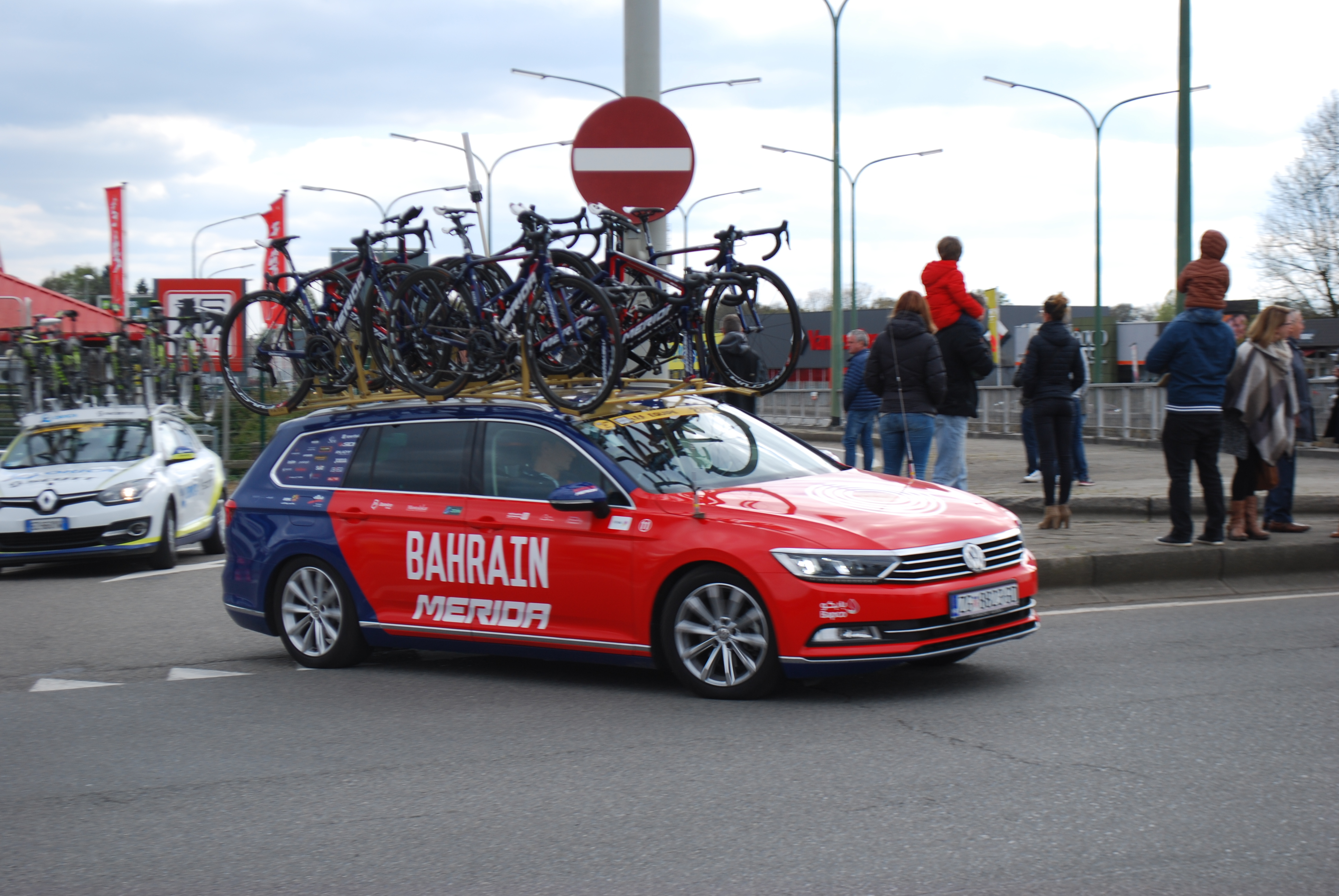 Vue de la course cycliste Liège-Bastogne-Liège 2017 à Boncelles.